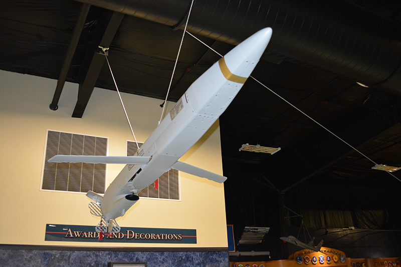 Raytheon ADM-160B MALD exposé au Air Force Armament Museum.